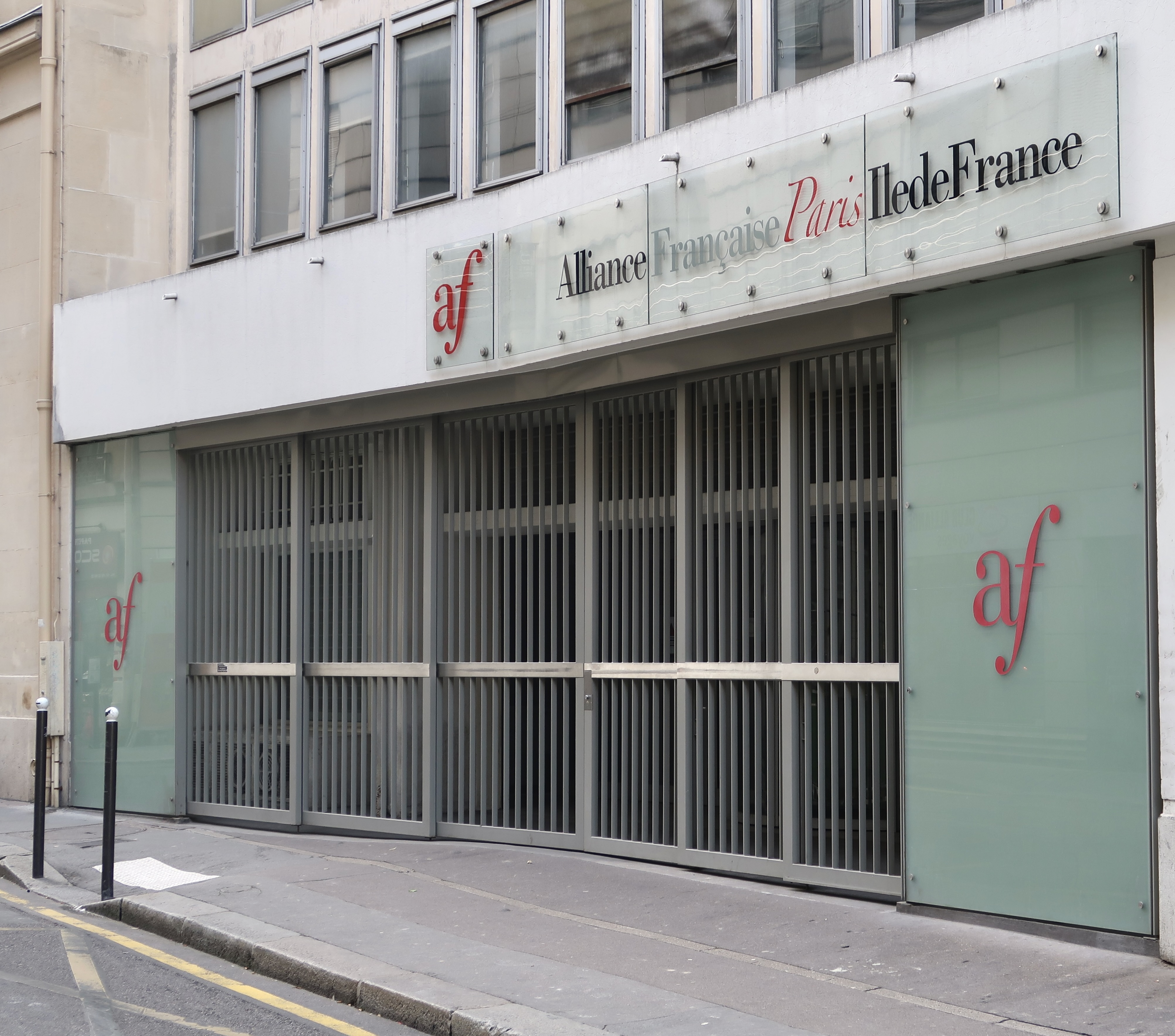 Alliance française, 34 rue de Fleurus (Paris, 6e).